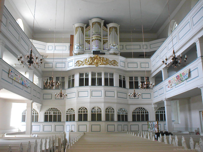 Empore an der Westseite der Kirche St. Bartholomäus in Wolkenstein (Erzgebirge)